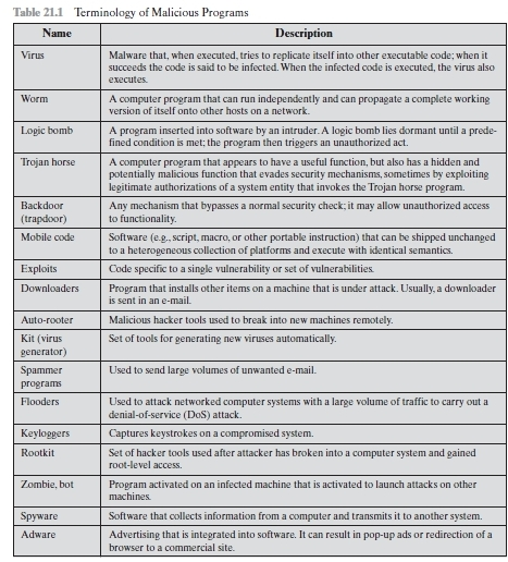 Viruset